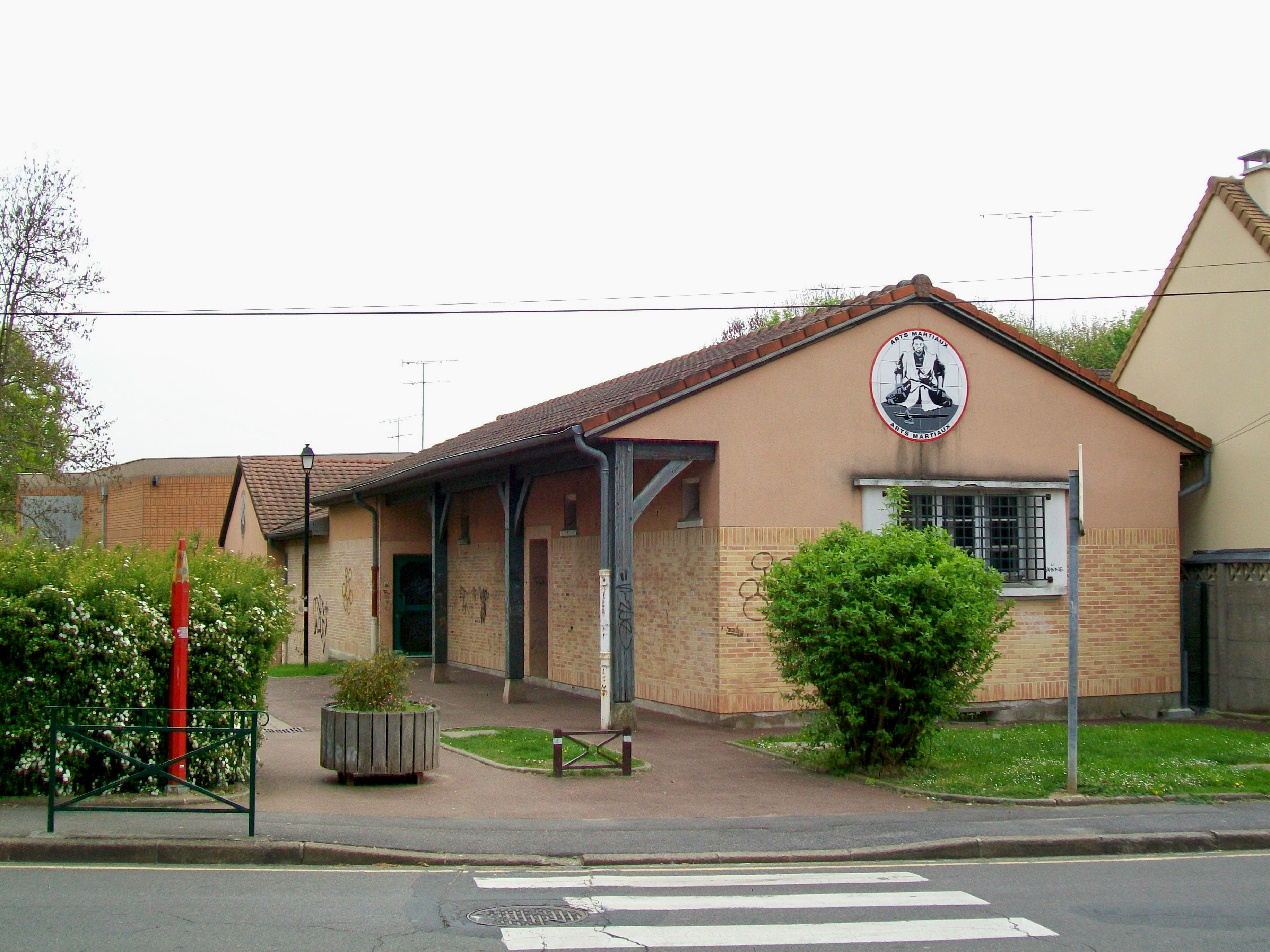 Le dojo, salle d'arts martiaux, avenue de la Libération.